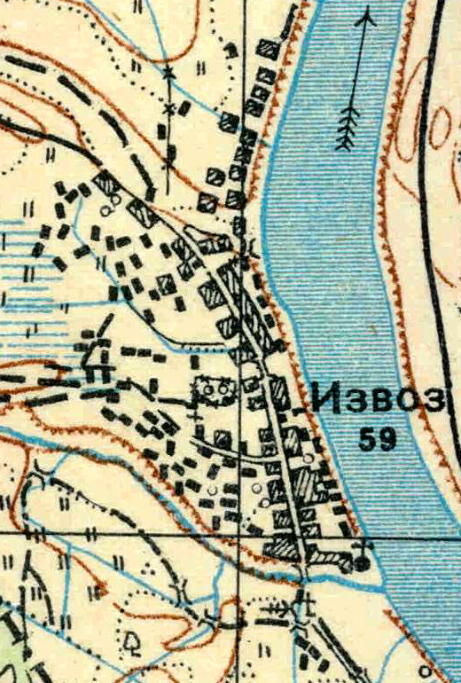 Топографическая карта Ленинградской области, квадрат О-35-21-Г-а (Орлы), деревня Извоз.